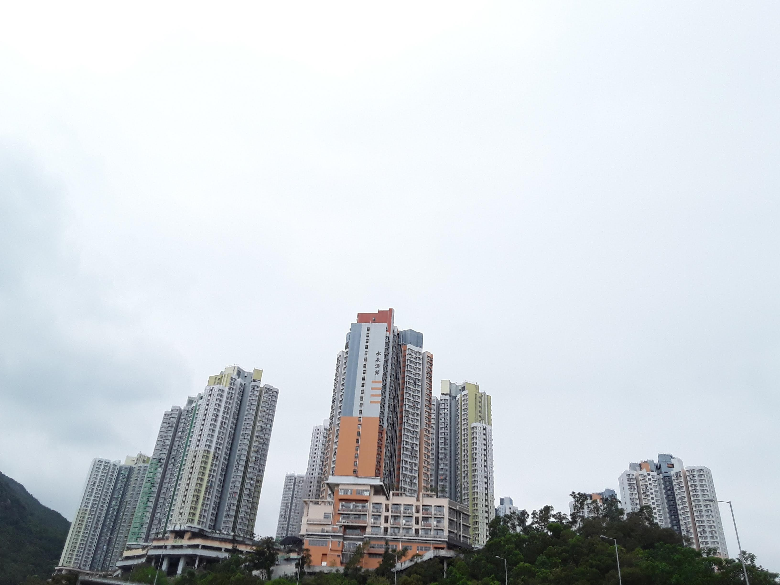 多石仰望水泉澳邨北面